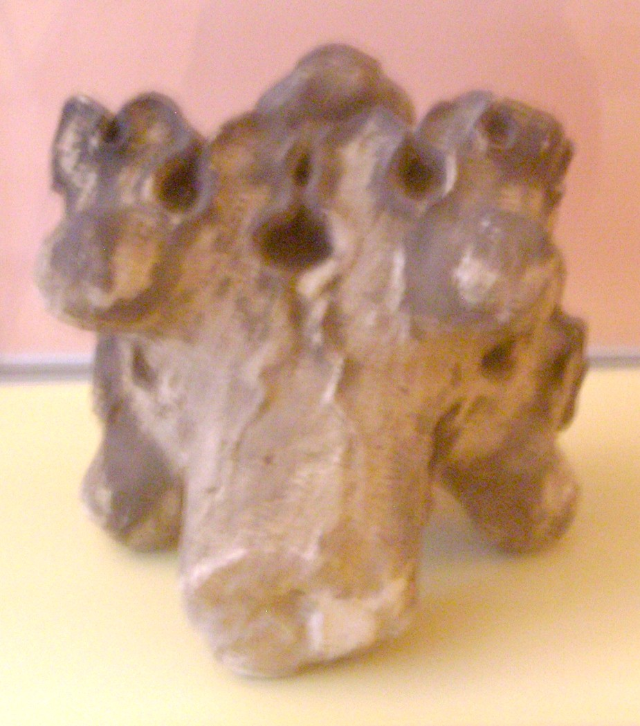 Zweite Kreuzblume des Alten Johann Sebastian Bachdenkmals Leipzig (im Bach-Archiv).